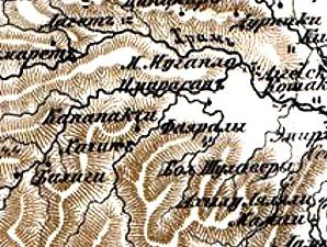 Село Фахралы на пяти верстной карте Кавказского края 1869-ого года